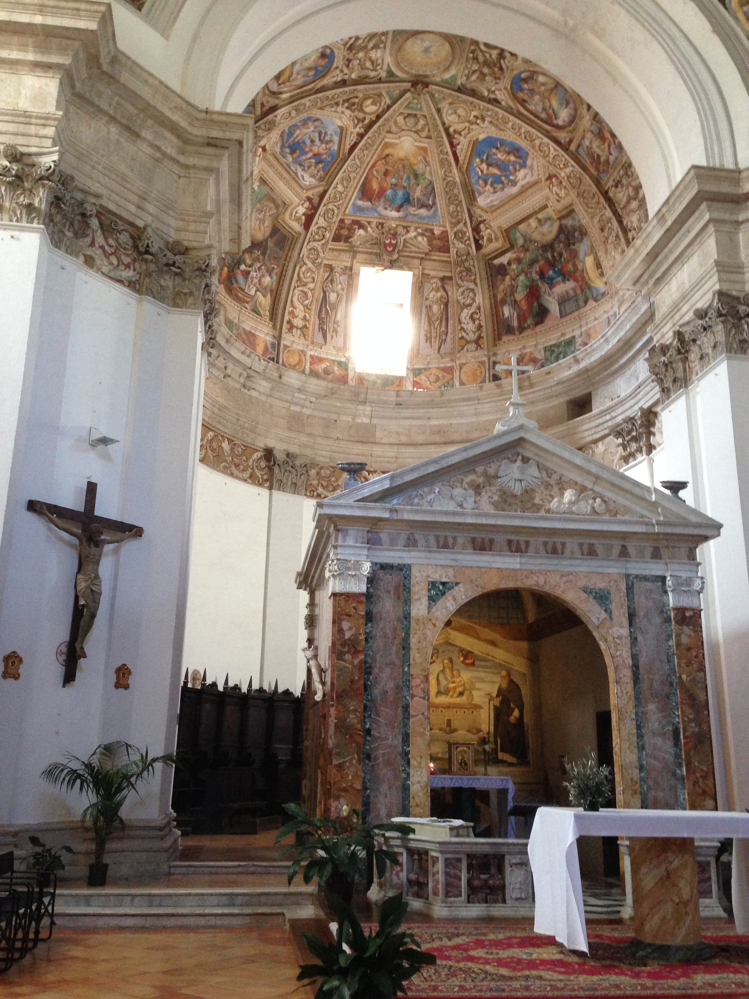 Spoleto. Santuario della Madonna di Loreto, cappella